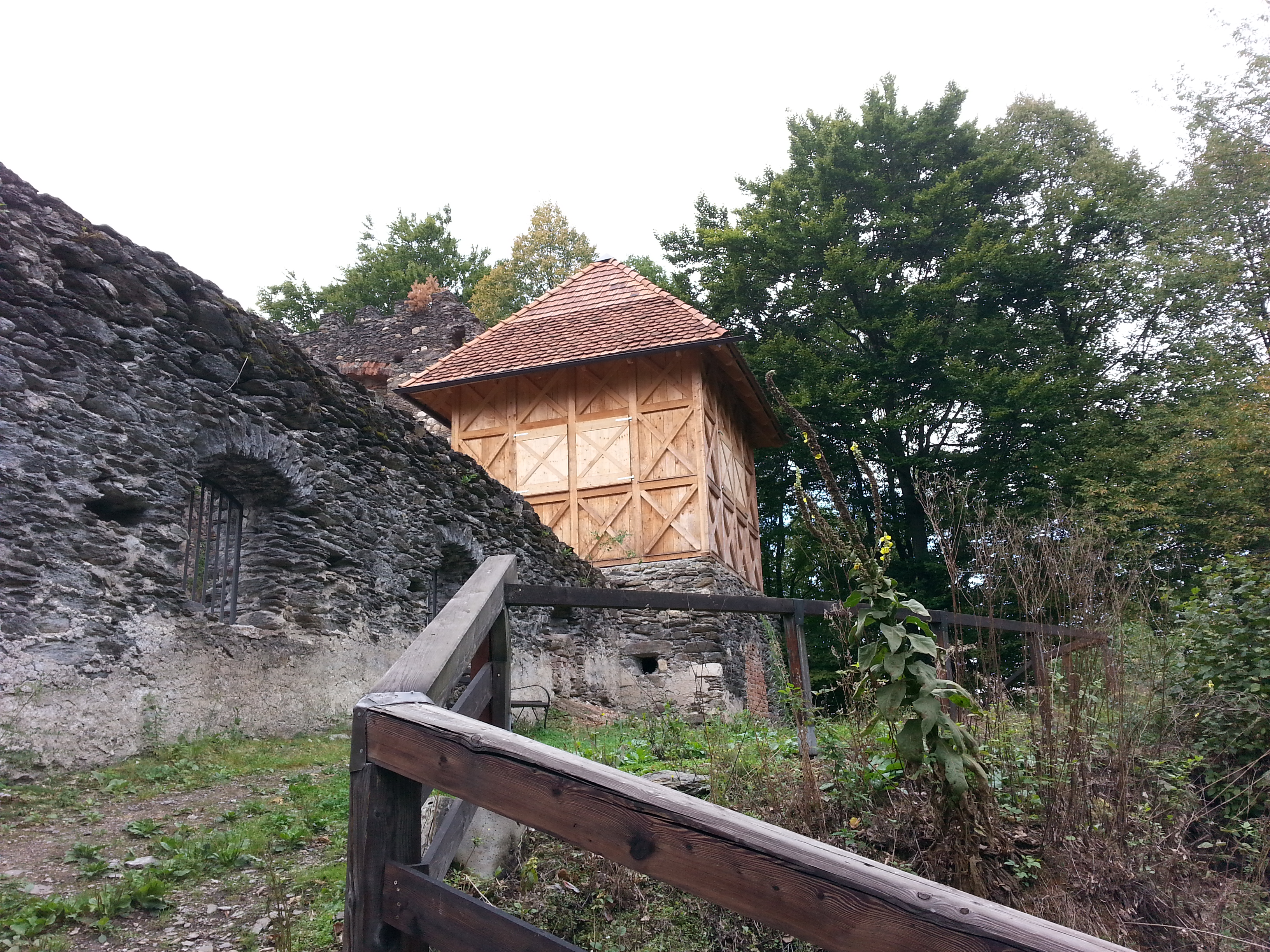 Burgruine Krems